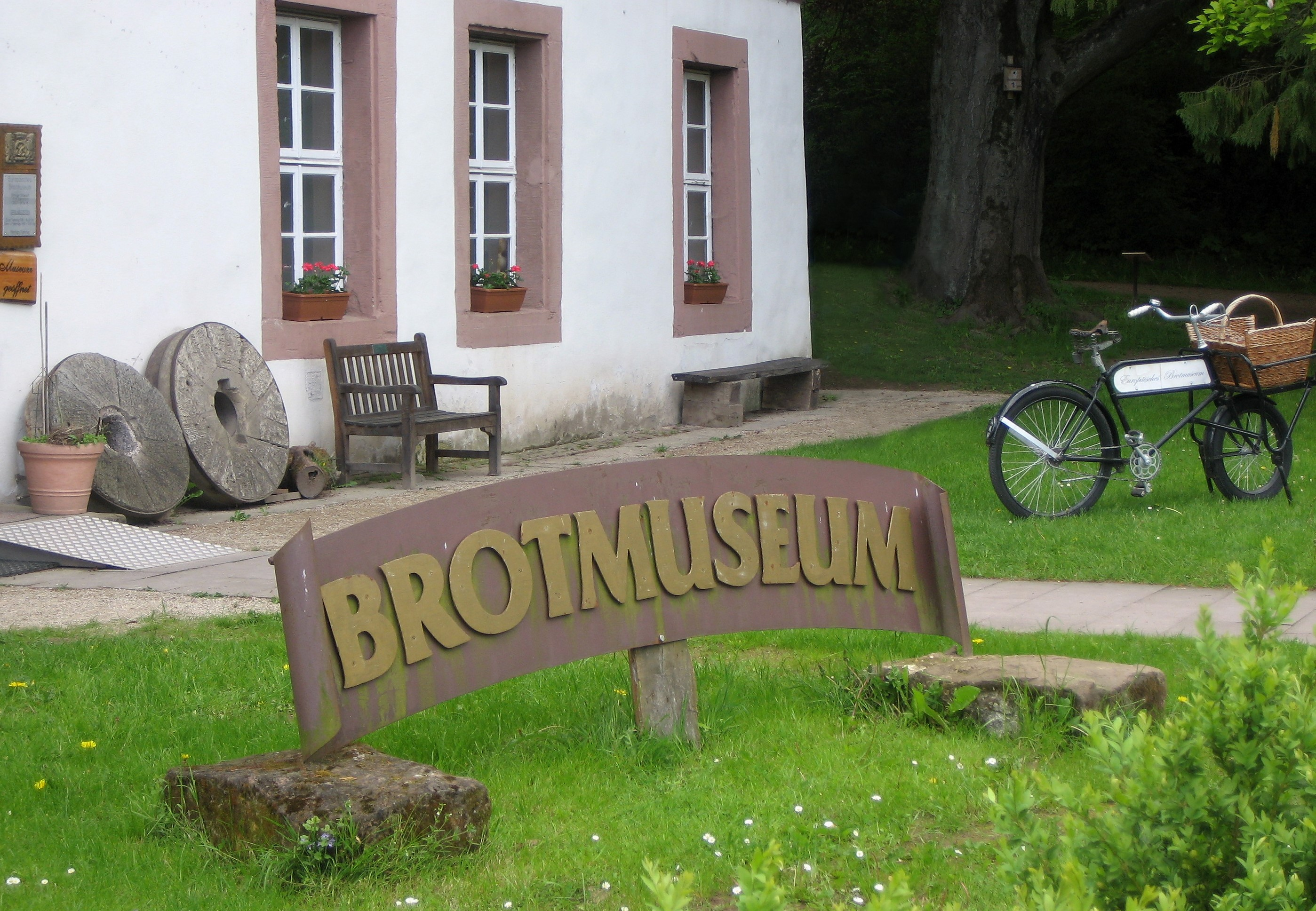 Europäisches Brotmuseum in Ebergötzen.